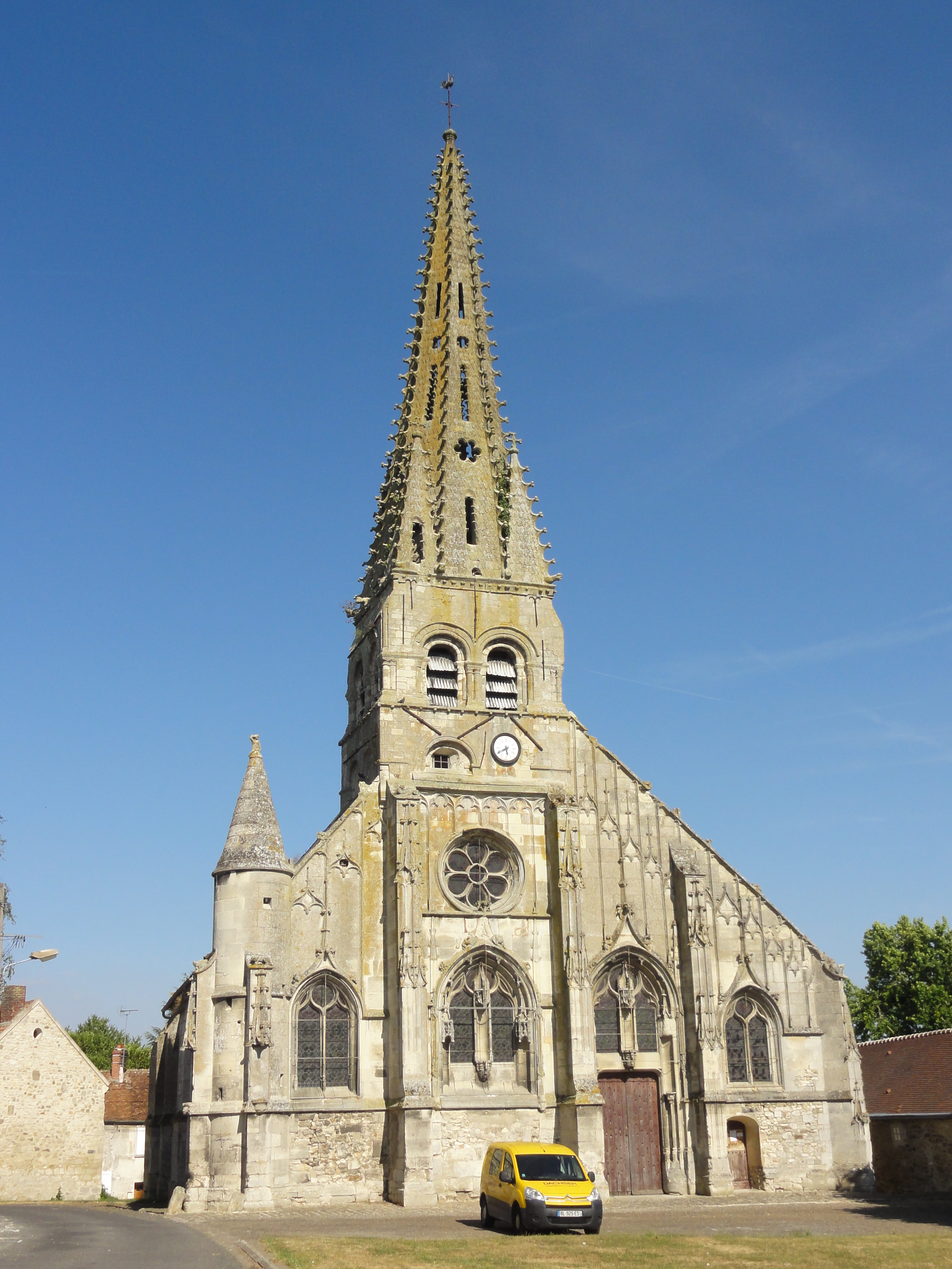 Voir titre.